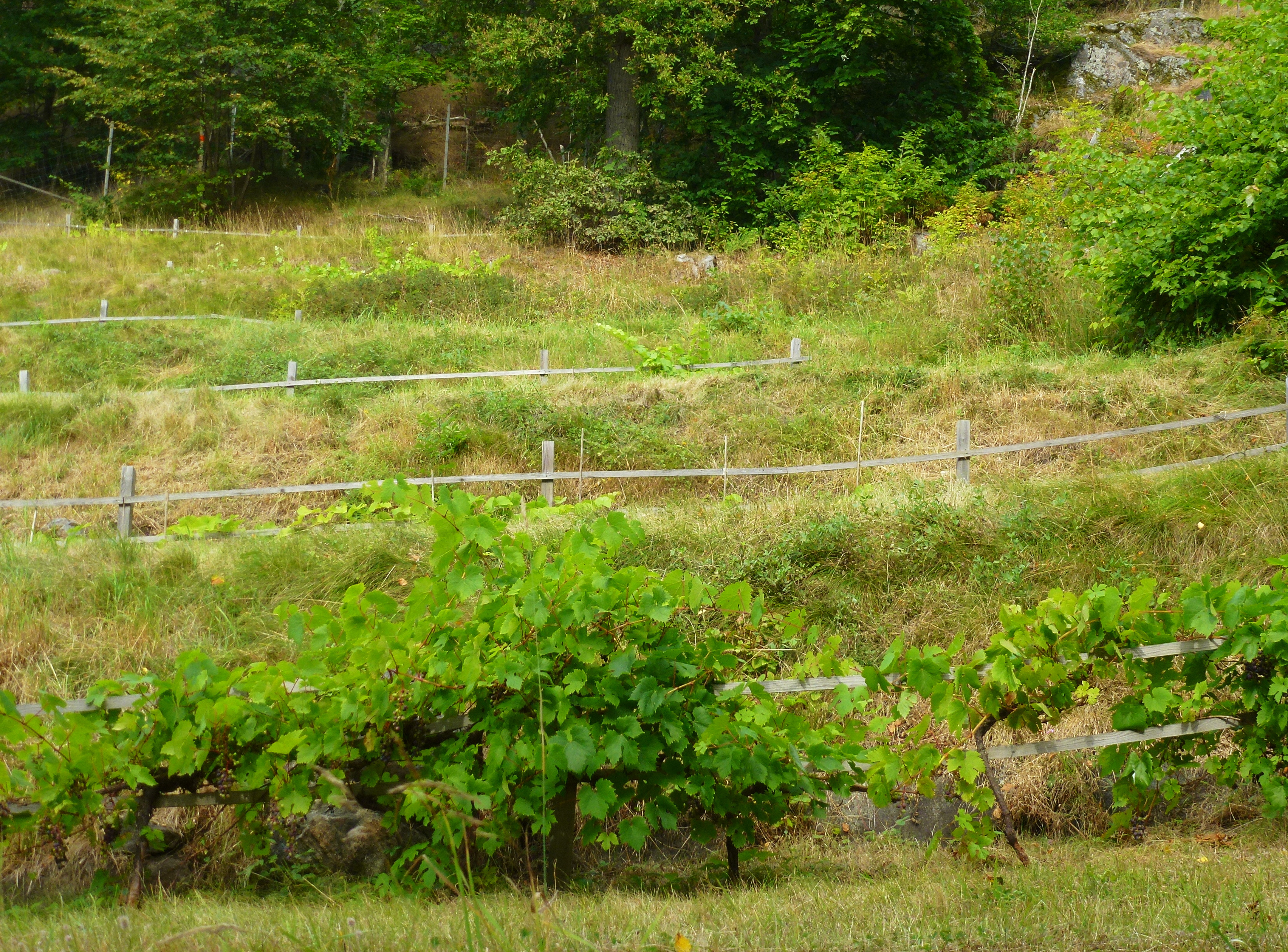 Velamsunds vinberg